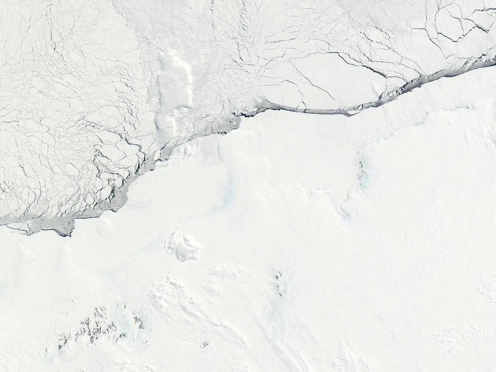 Königin Maud Land in der Antarktis